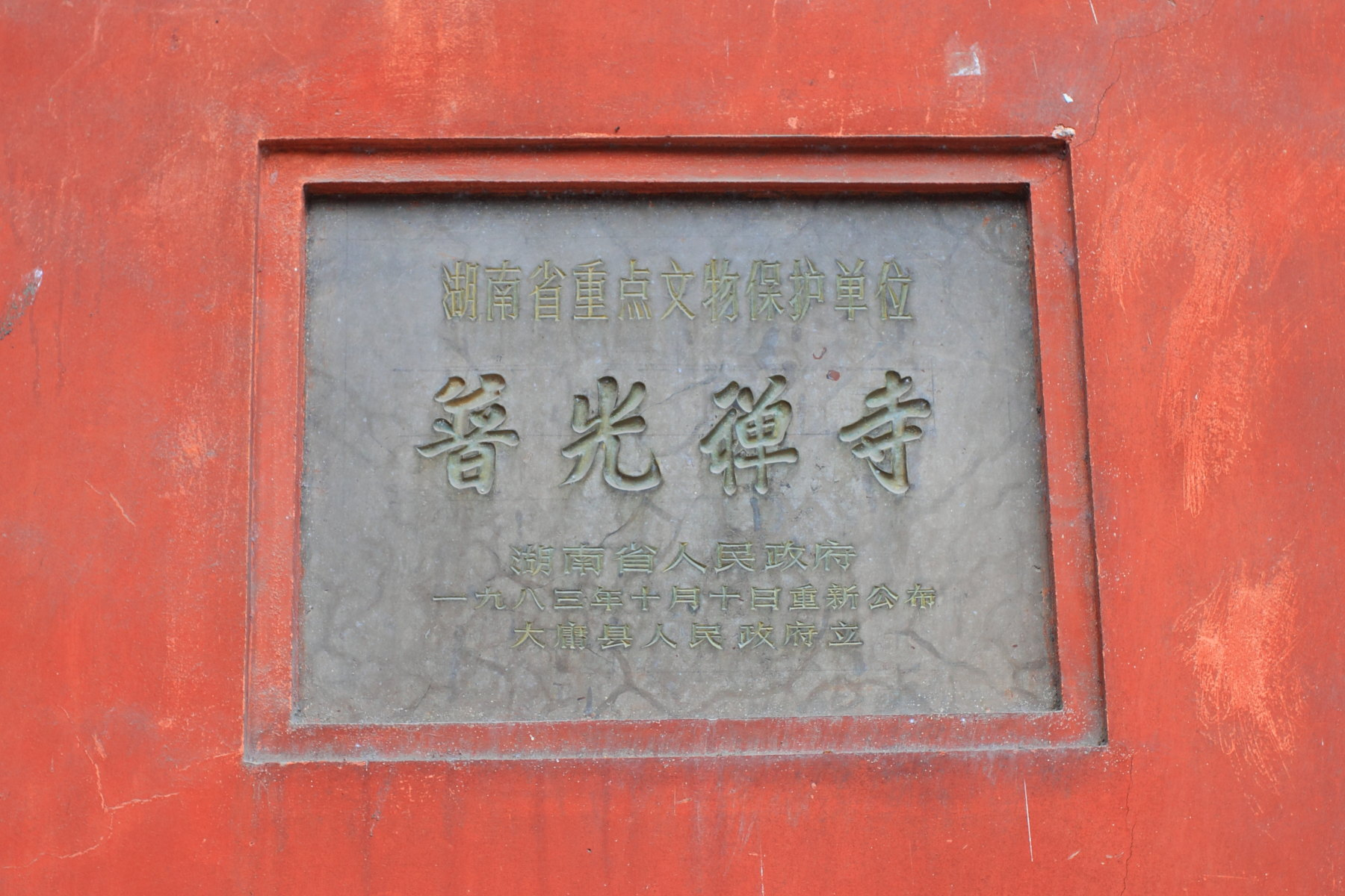 普光禅寺，湖南省文物保护单位，位于张家界市永定区。